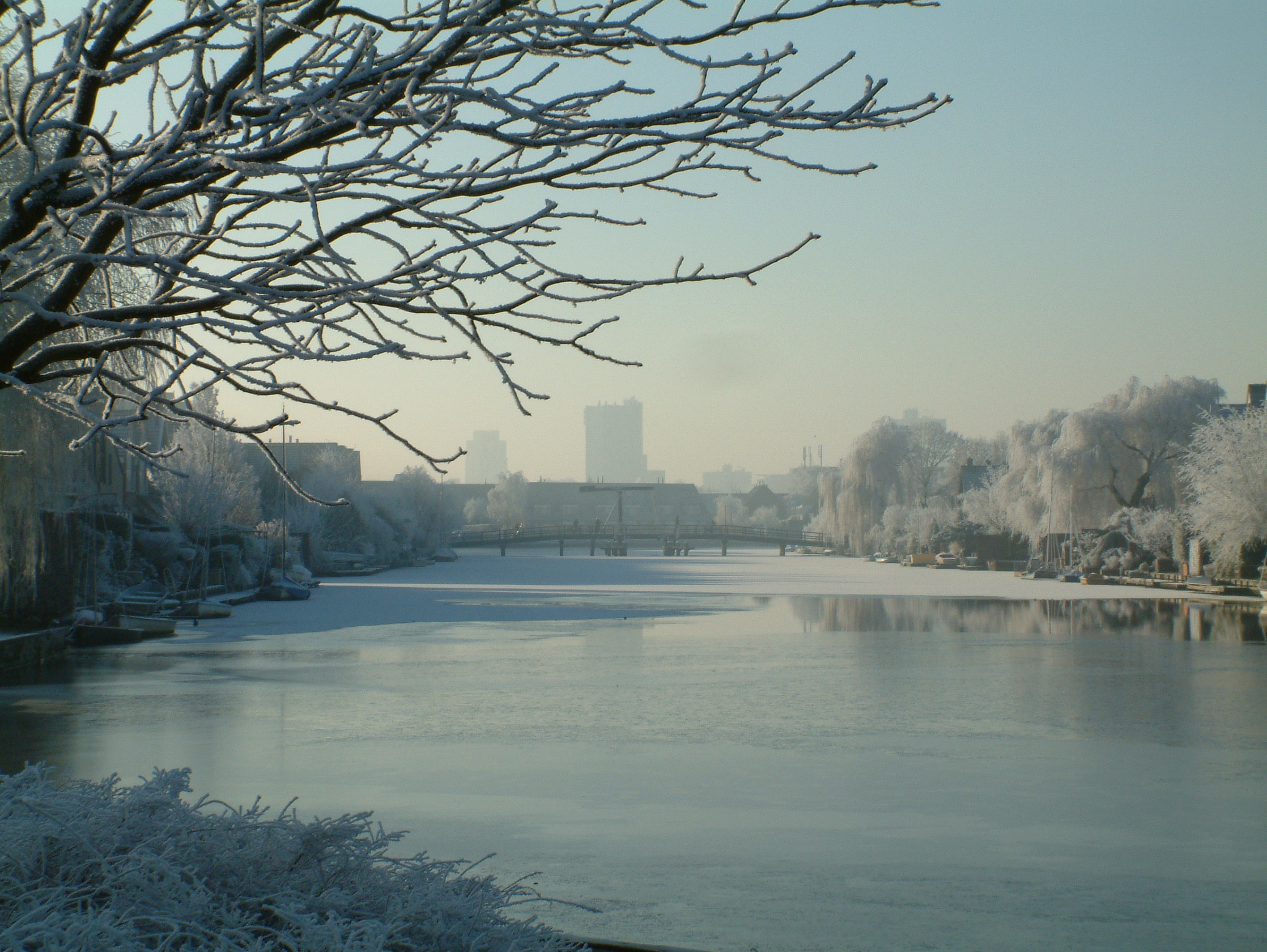 De Broekwegwetering in Zoetermeer in de winter